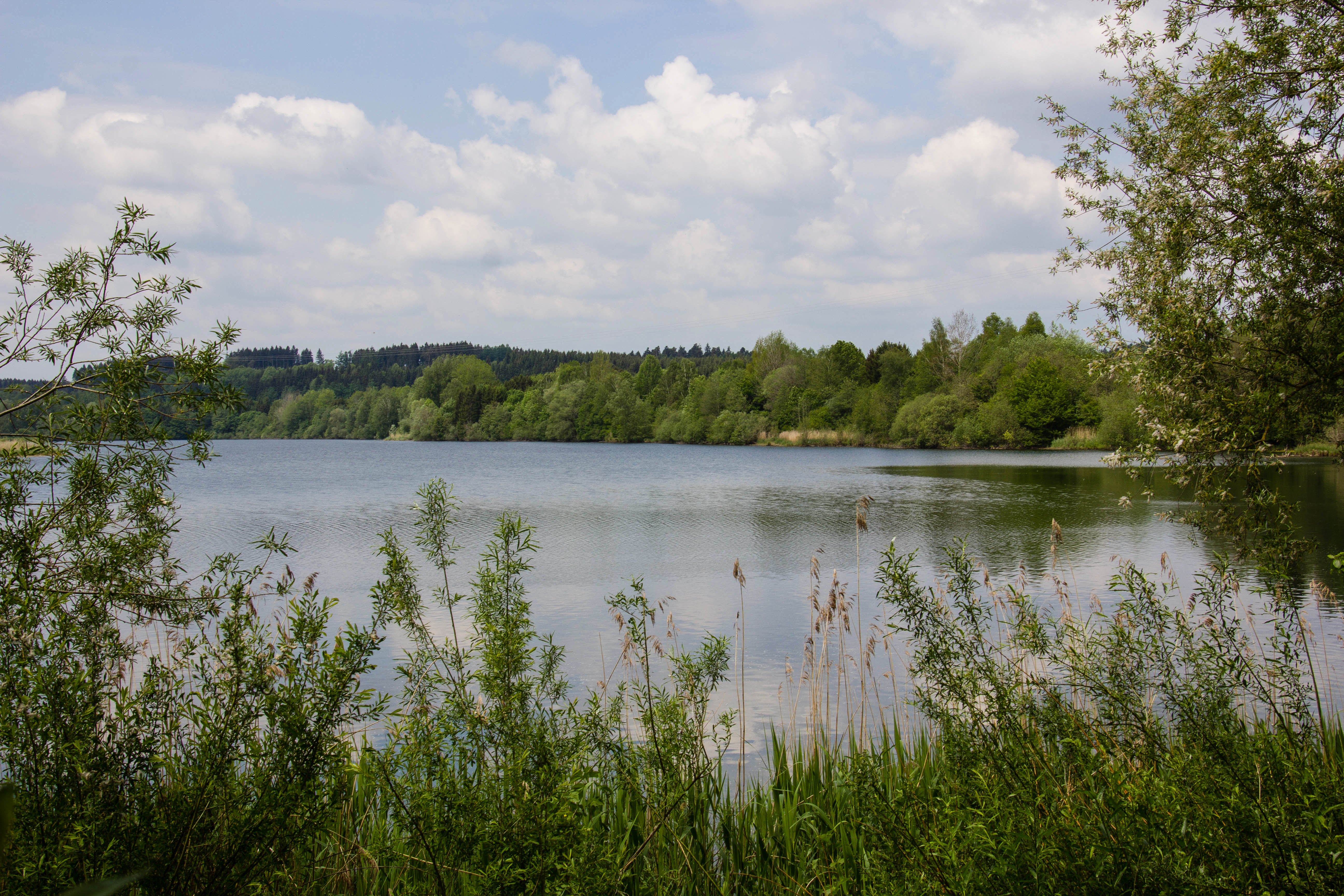 Deutschland Baden-Württemberg Landkreis Sigmaringen Naturschutzgebiet Zielfinger Vogelsee